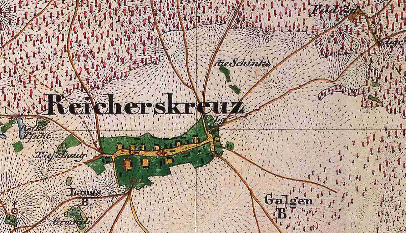 Reicherskreuz, Ortsteil der Gemeinde Schenkendöbern, Lkr. Spree-Neiße, Brandenburg, Deutschland. Ausschnitt aus dem Urmesstischblattes 3953 Groß Muckrow von 1844